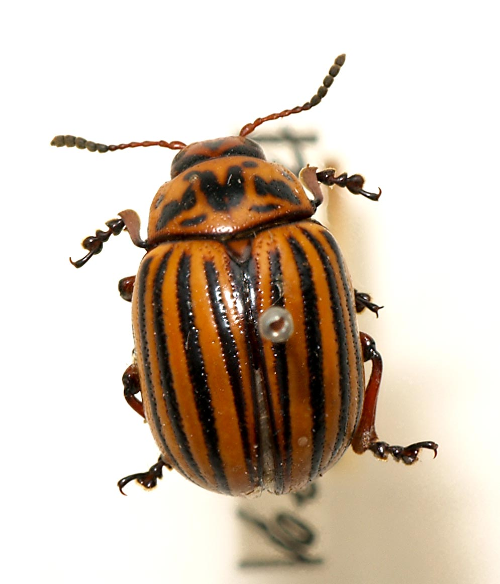 Leptinotarsa decemlineata